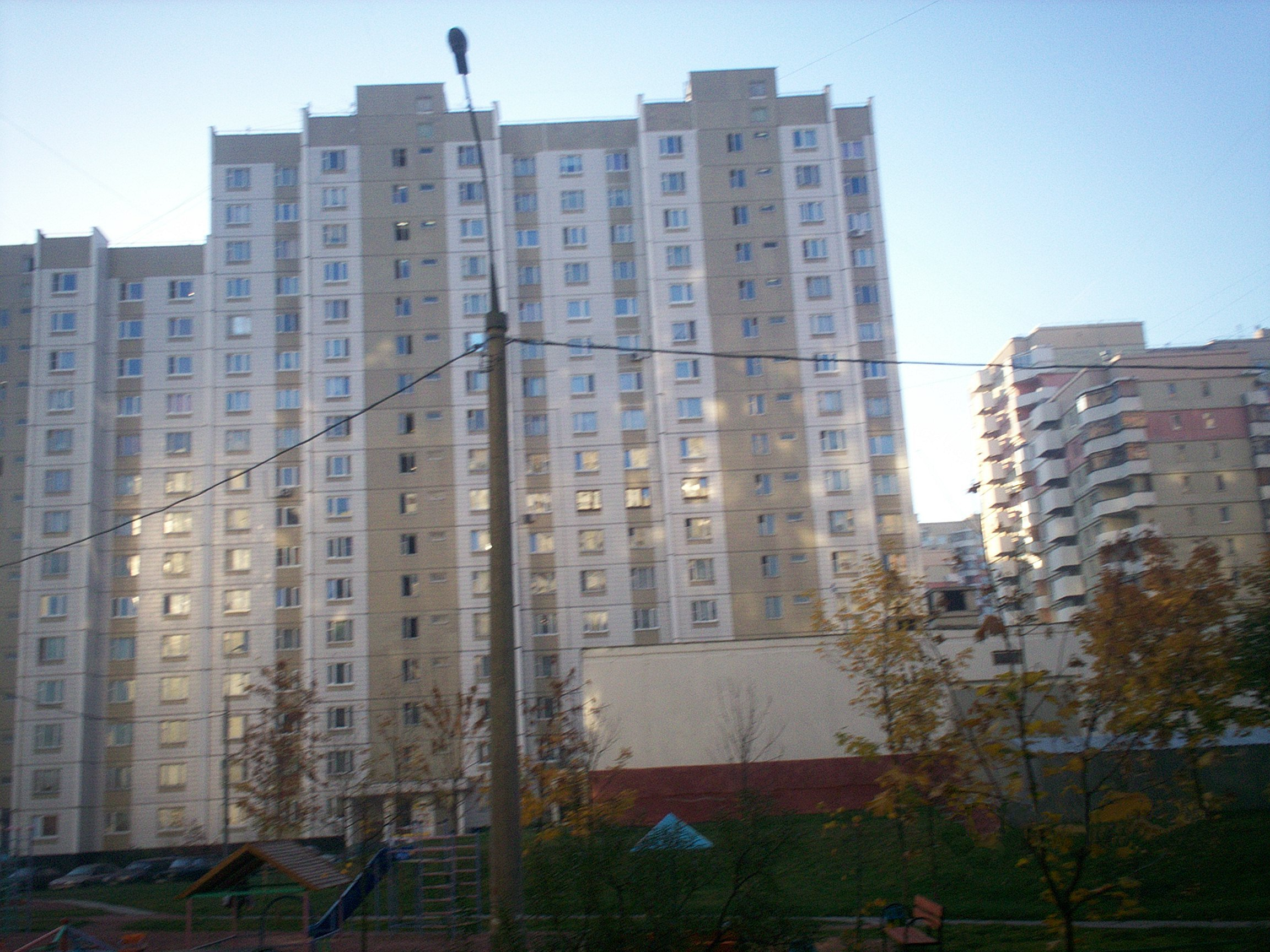 Москва, 12-й микрорайон Митина.